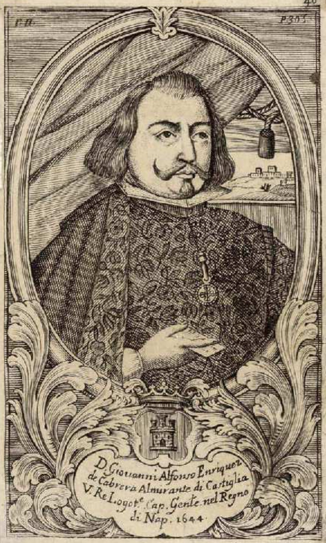 Portrait of Juan Alfonso Enríquez de Cabrera y Colonna (1600-1647), IX Almirante de Castilla y grande de España, virrey de Nápoles, recogido en el libro Teatro eroico, e politico de governi di Vicere del Regno di Napoli Dal tempo del Re Ferdinando il Cattolico Fino al presente, de Domenico Antonio Parrino (1694)